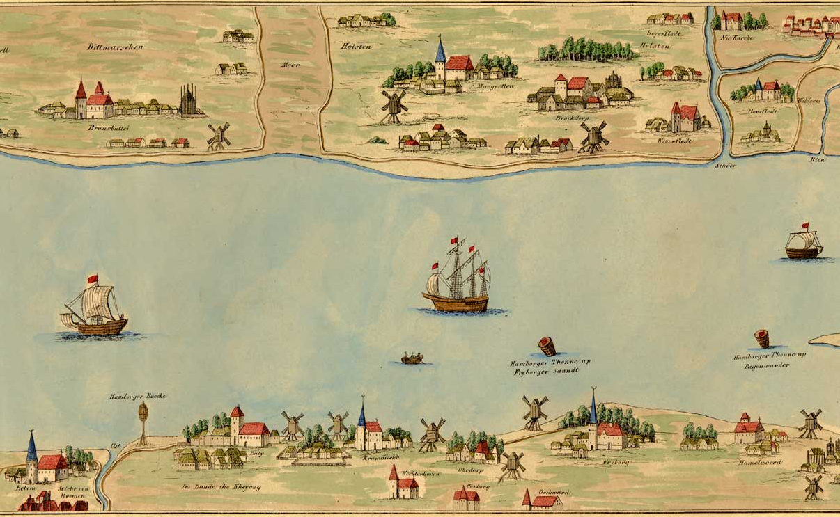 Ausschnitt aus der Elbkarte mit der Oste und dem Land Kehdingen, dem Stammland der Familie von der Decken. Diese Elbkarte ist eine Nachzeichnung von 1845. Die Originalkarte malte Melchior Lorichs 1567.